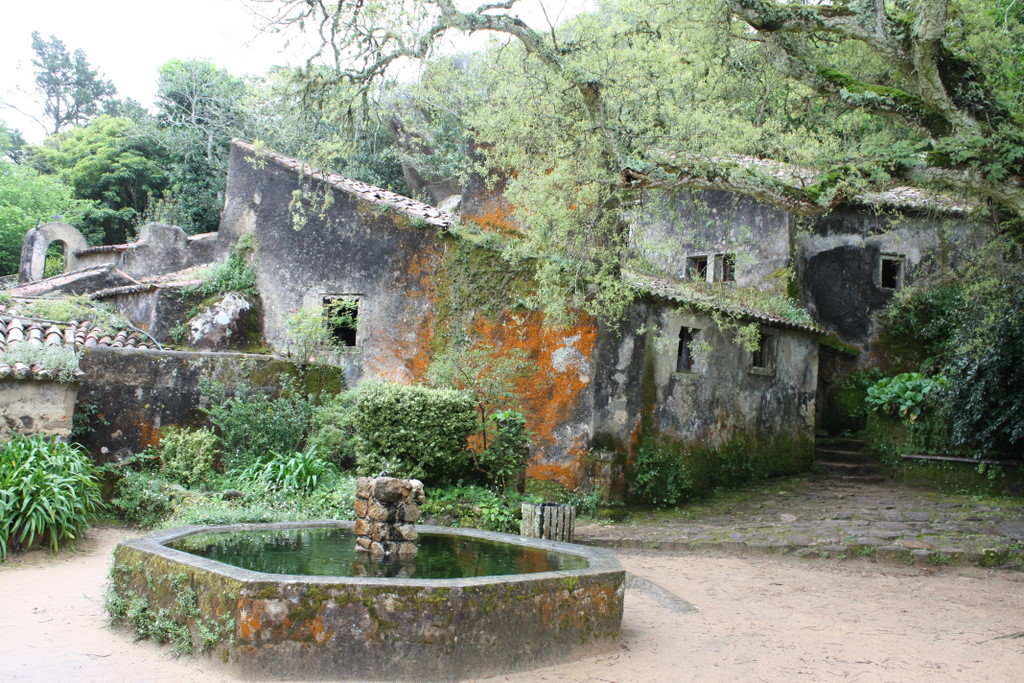 Convento dos Capuchos This file was uploaded for Wiki Loves Monuments in Portugal with the unique identifier 72838.